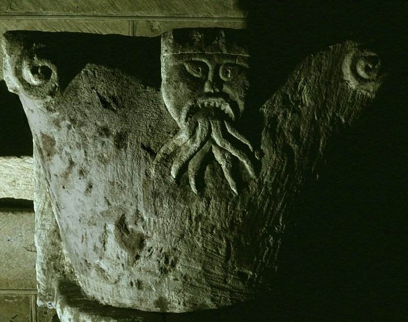 Église Saint-Hilaire le Grand - chapiteau intérieur (XIe) : avaleur de serpents.